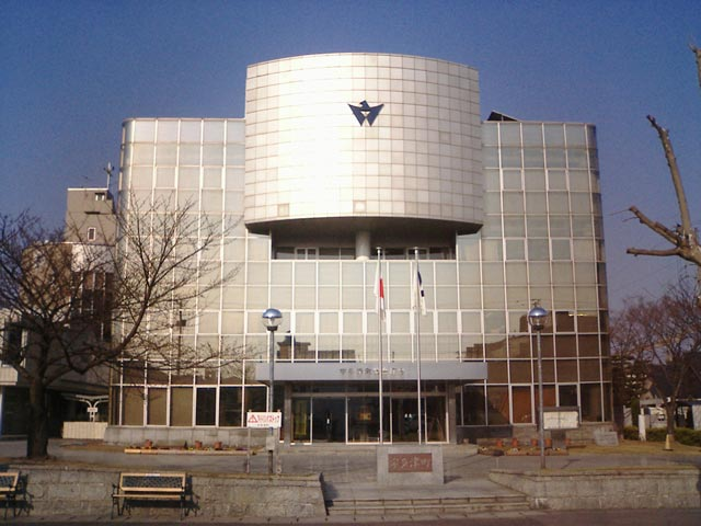 宇多津町の役場 - 日本国香川県宇多津町。